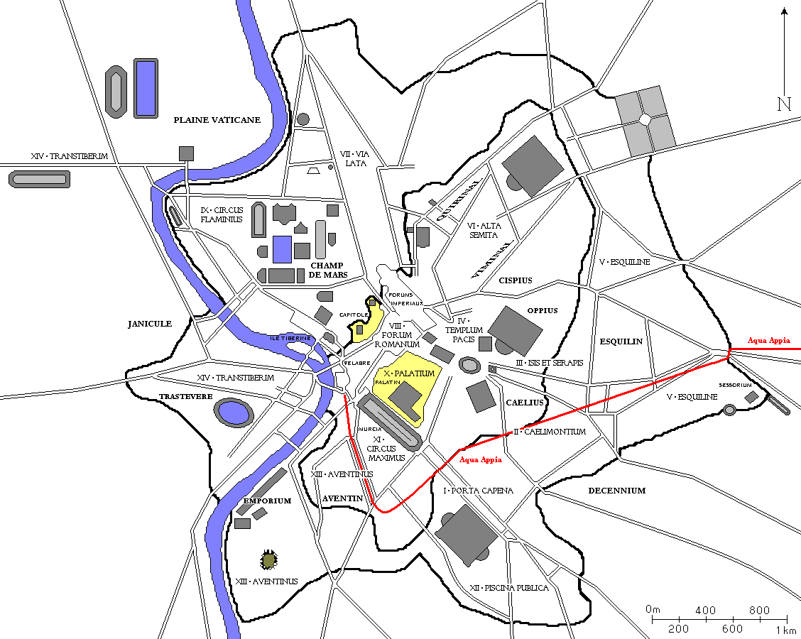 Plan de Rome avec l'Aqua Appia en rouge.